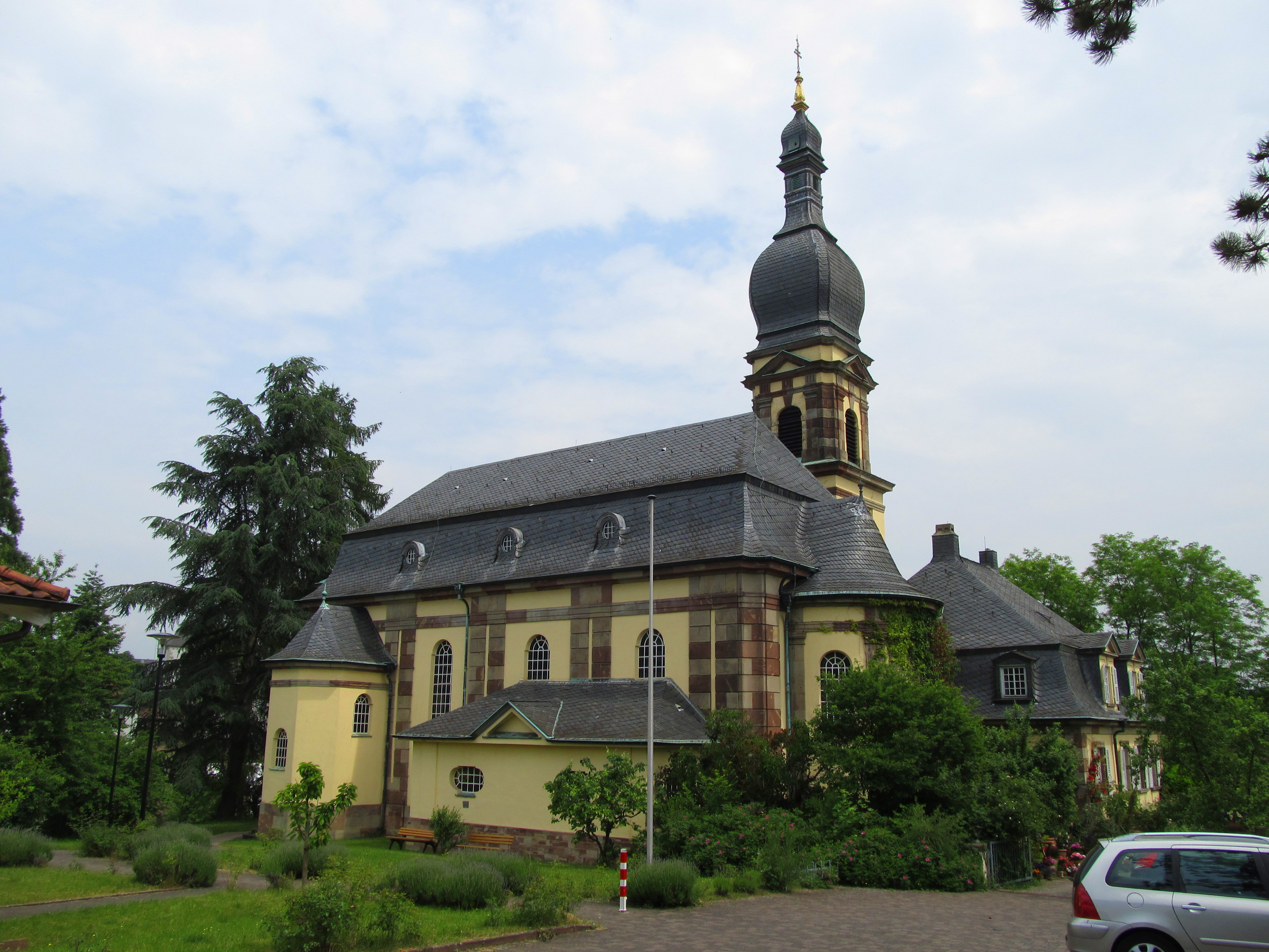 Blick aus westlicher Richtung auf die Protestantische Kirche in Blieskastel